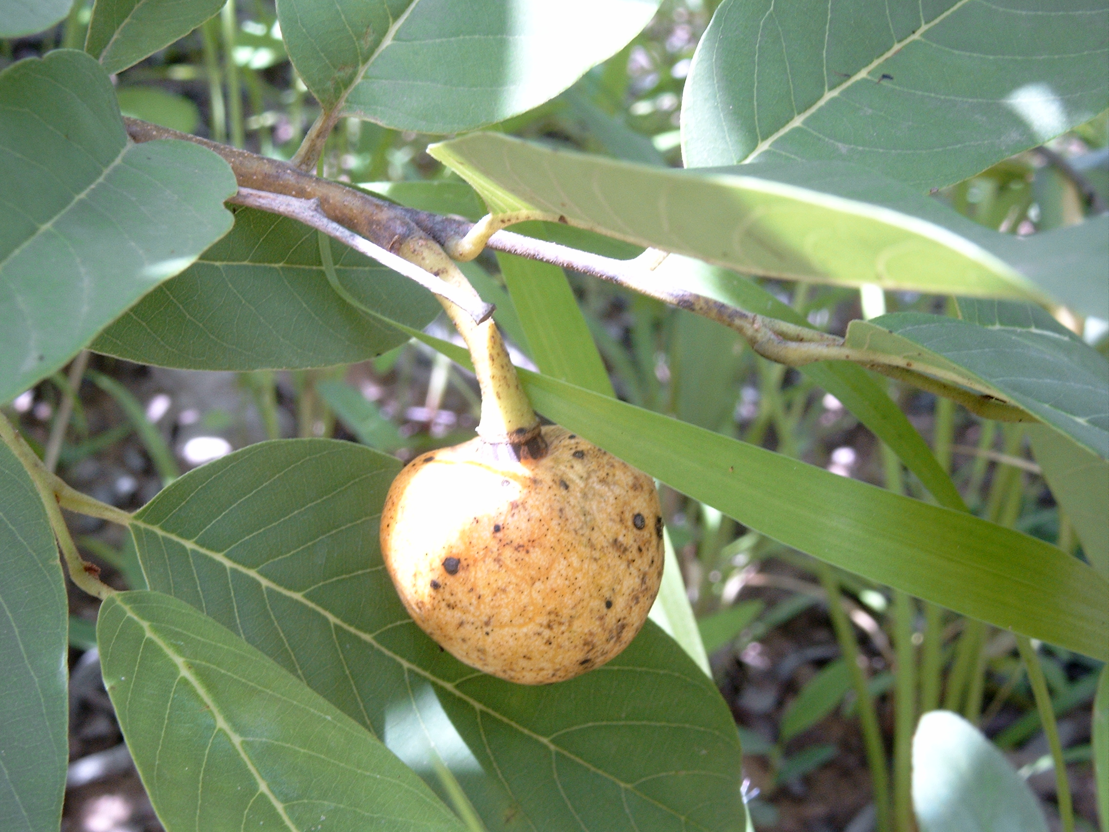 Annona senegalensis, fruit. Near Fada N'Gourma, Burkina Faso.